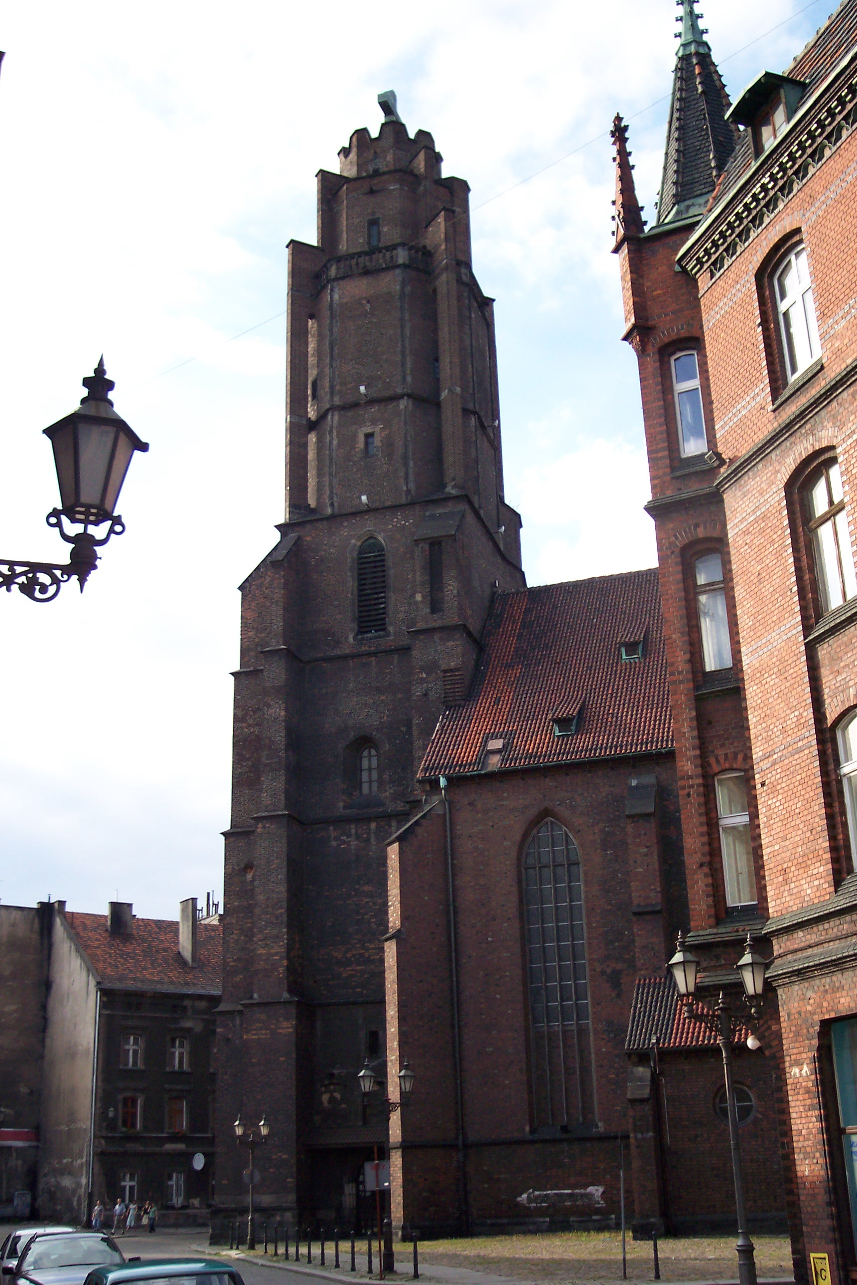 Kościół Wszystkich w Gliwicach